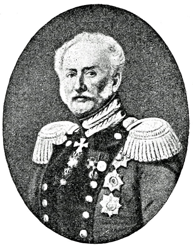 Это изображение было использовано для иллюстрирования статьи «Ден 1-й, Иван Иванович» опубликованной в девятом томе «Военной энциклопедии», который был издан книгоиздательским товариществом И. Д. Сытина в 1912 году в столице Российской империи городе Санкт-Петербурге.